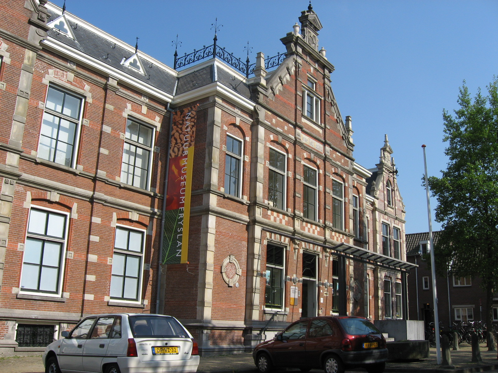 Natuurmuseum Fryslân